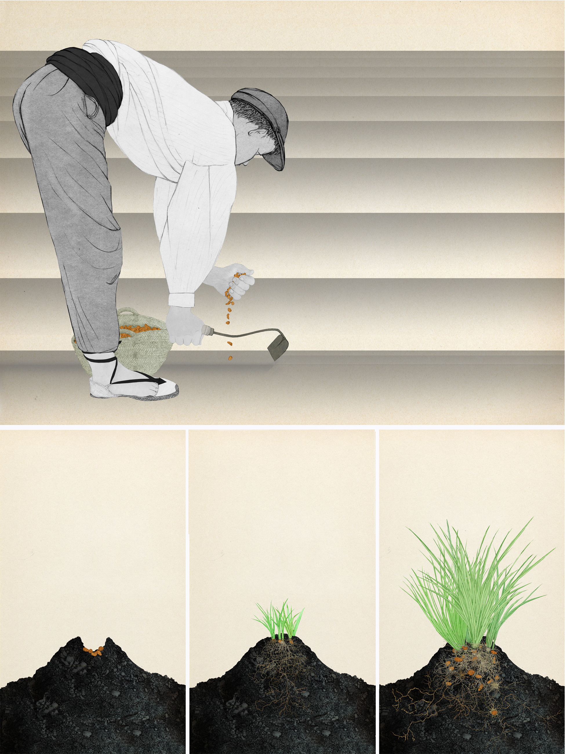 Imatge realitzada pel Museu Valencià d'Etnologia per al Museu de l'Horta d'Almàssera. Representa un llaurador plantant xufa i el procés de creixement d'esta.